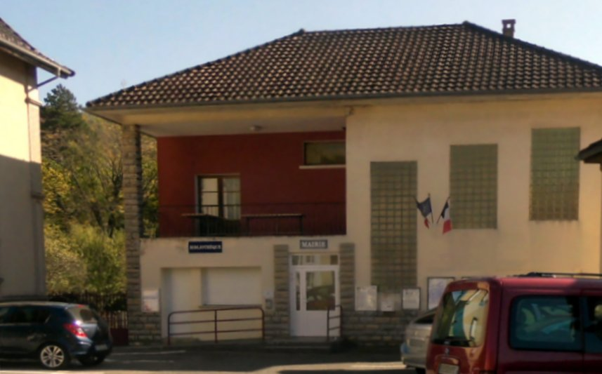 La mairie de Villars-sous-Dampjoux